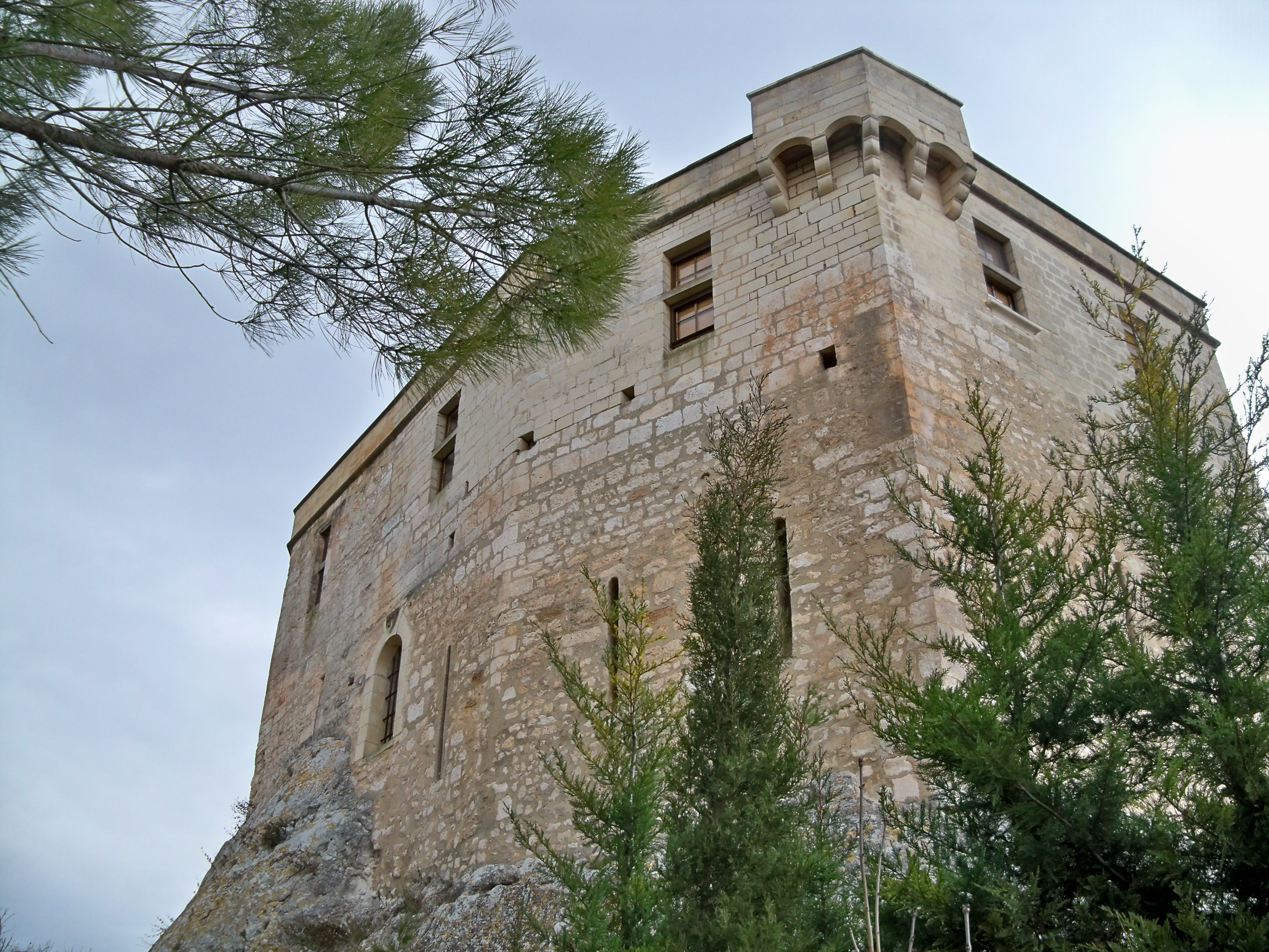 Château de Rochefure, à Apt (Vaucluse)